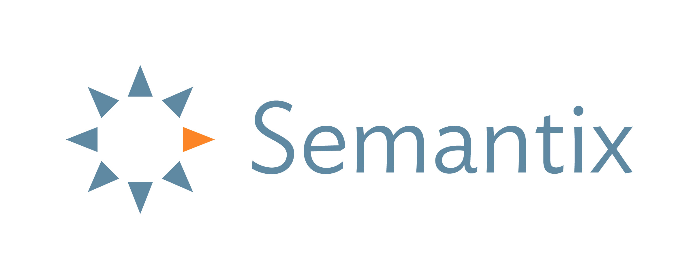 Semantix logo